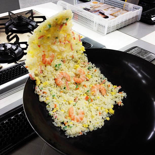 チャーハン！